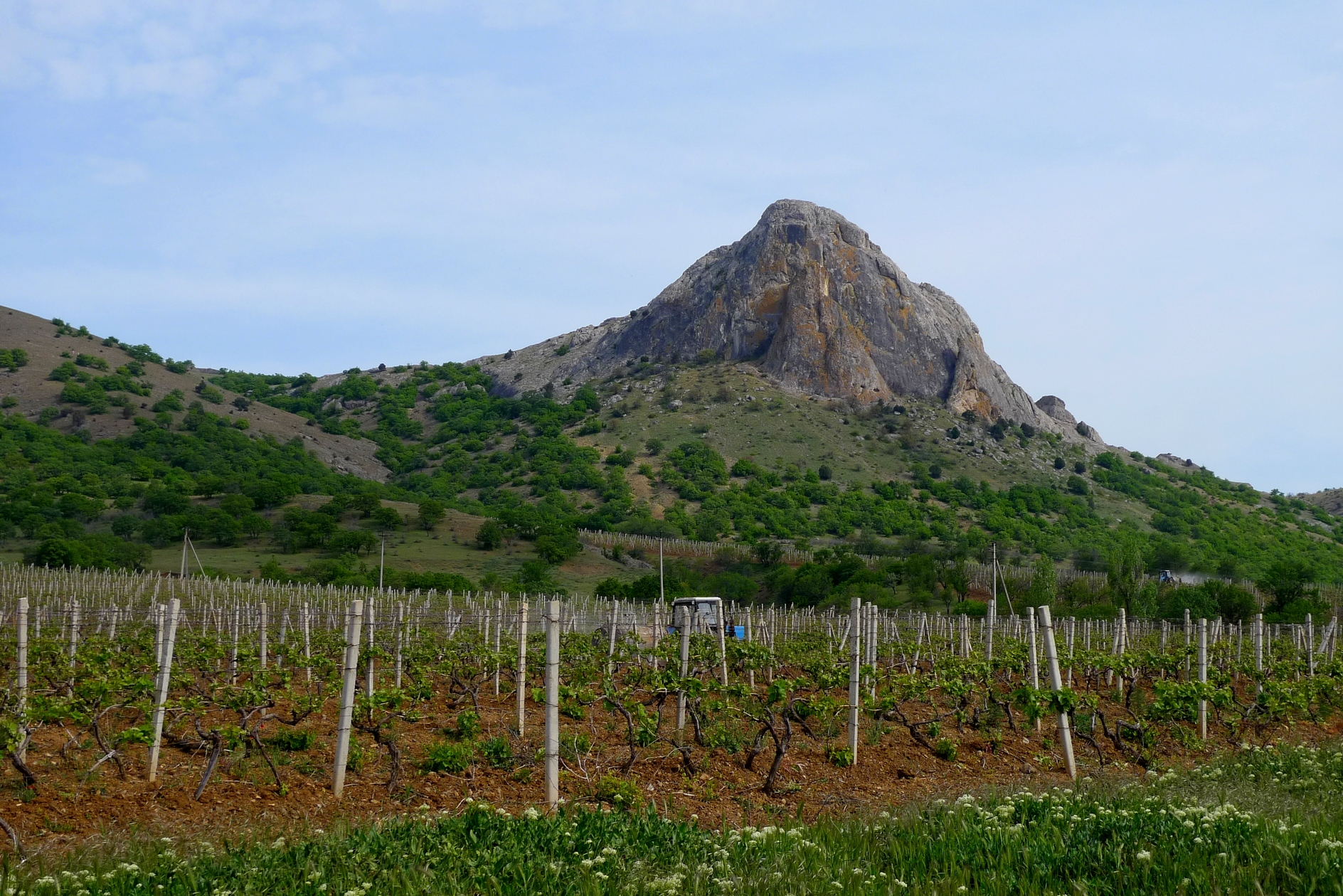 Виноградники Судакской долины